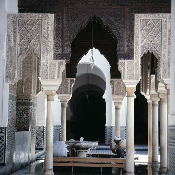 Op deze foto is de fontein op de binnenplaats van de moskee te zien. De Qarawiyin-moskee in Fès is in 857 (als kapel) gesticht door Fatima al-Fihri, de dochter van een rijke migrant uit de Tunesische stad Kairouan. De naam Qarawiyin verwijst naar de migranten uit deze stad. Het jaartal van oprichting valt in de tijd van de dynastie der Idrissieden (786-920). Tijdens deze dynastie werd de stad Fès gesticht, die door haar gunstige ligging en strategische positie tot bloei kwam. Naast handel en industrie, waren de islamitische wetenschappen belangrijk voor deze stad. Hierbij speelde de Qarawiyin-moskee, die ook dienst deed als universiteit, een belangrijke rol. Tussen 1135 en 1142 is de moskee in opdracht van de Almorawidische leider Ali ibn Yusuf (1106-1143) uitgebreid. De 18 schepen tellende gebedszaal werd vergroot met nog eens 21 schepen. De moskee was een van de grootste moskeeën en een van de belangrijkste universiteiten van die tijd in de Maghreb. In haar hoogtijdagen trok ze 8000 studenten uit de hele Arabische wereld. Veel afgestudeerden van deze universiteit hebben een belangrijke rol gespeeld in het religieuze, politieke en culturele leven van Marokko. Op dit moment doet de Qarawiyin-moskee nog steeds dienst als moskee en universiteit en heeft de universiteit ook dependances in Marrakech, Rabat en Tétouan.